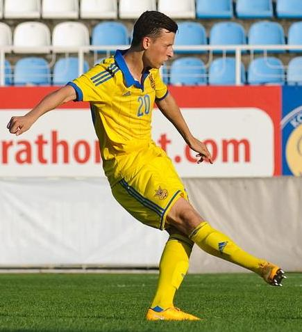 Дмитро Іванісеня у фіналі Турніру пам'яті Валерія Лобановського 2015